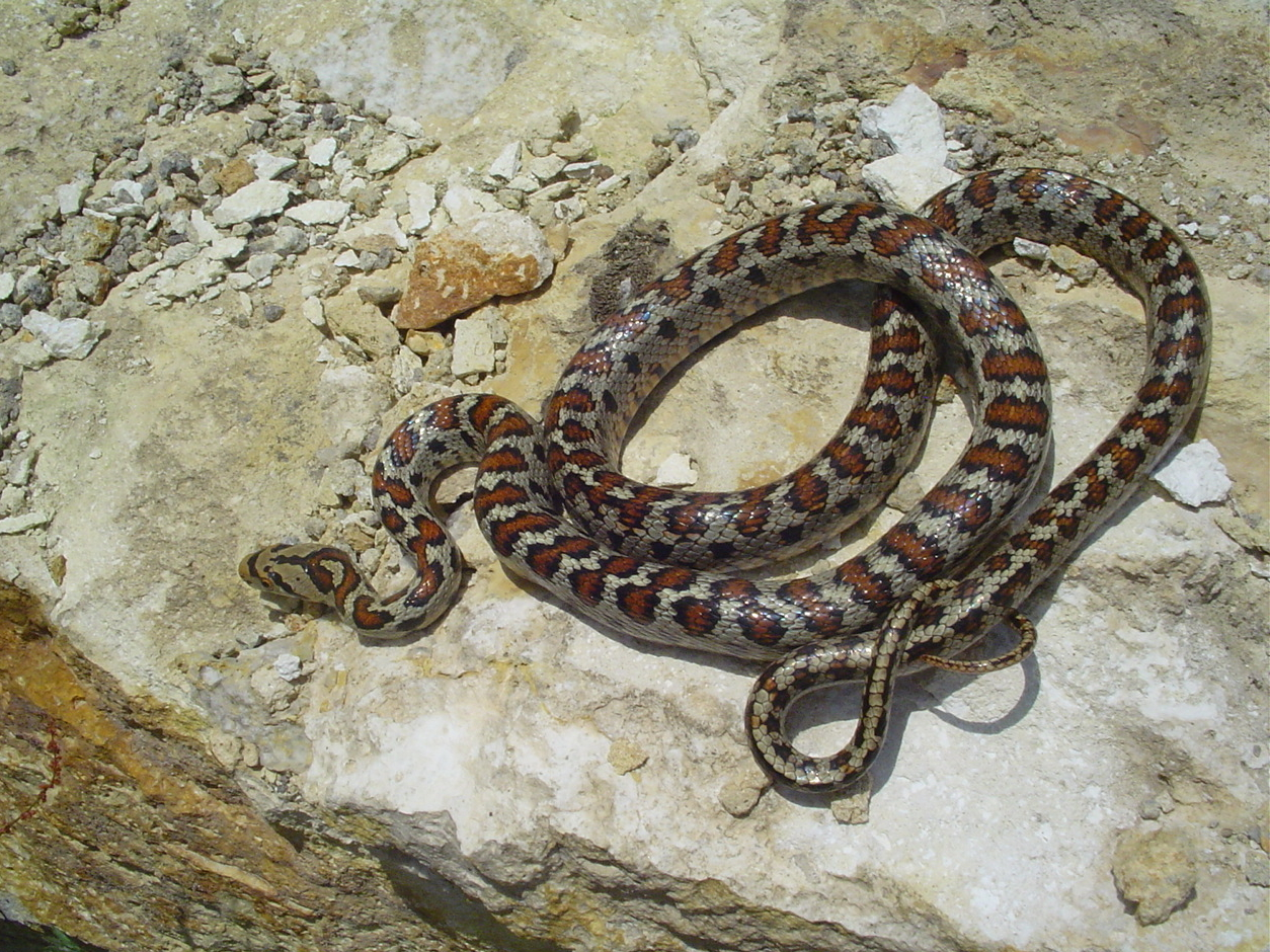 Elaphe situla